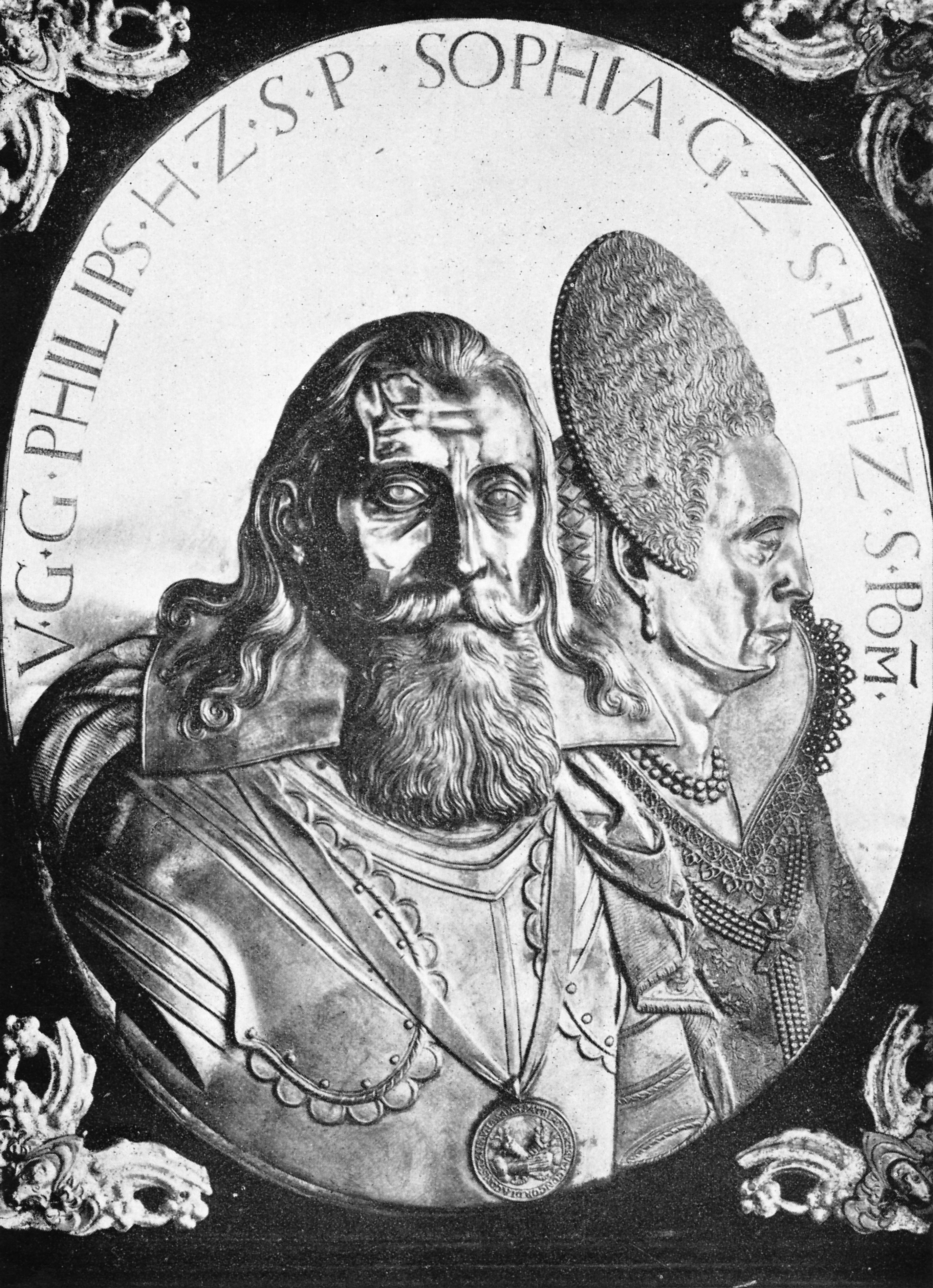 Silberrelief von Herzog Philipp II. von Pommern und seiner Gemahlin Sophie von Schleswig-Holstein